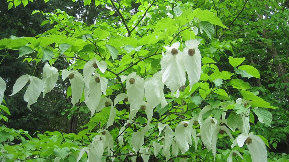 Floraison de l'arbre à mouchoirs - Classifica